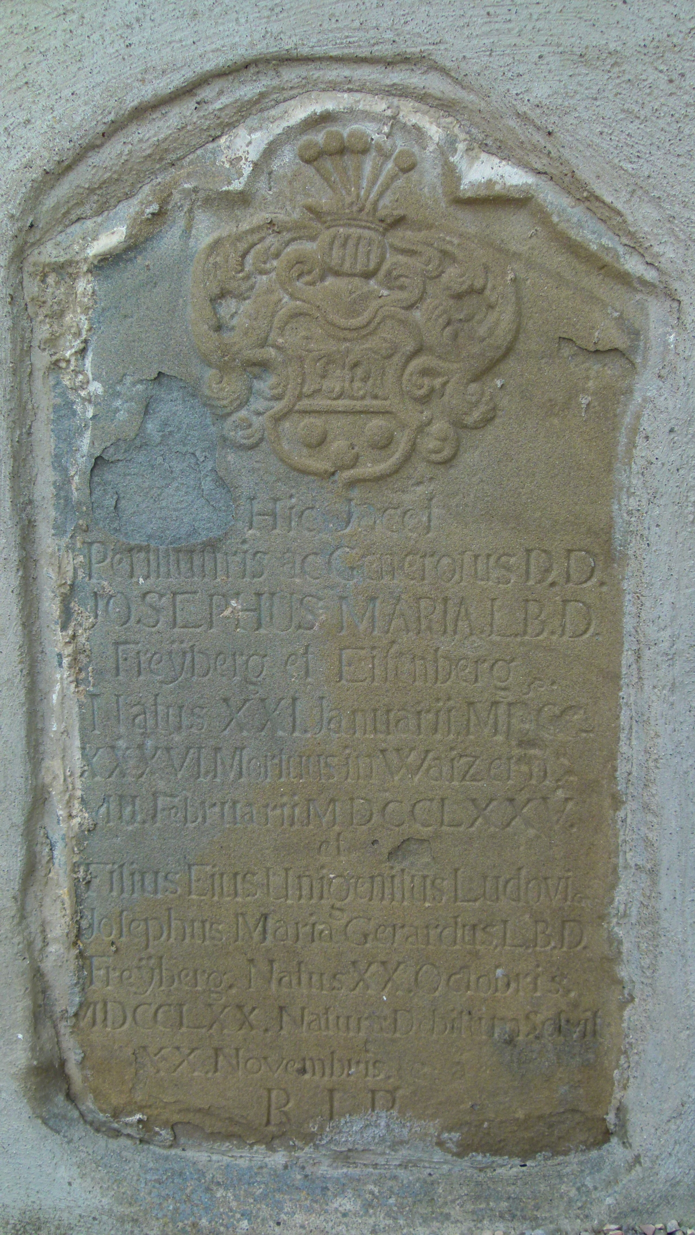 Grabmal für Joseph von Freyberg-Eisenberg (†1775) im Friedhof von Zell (Ostallgäu)